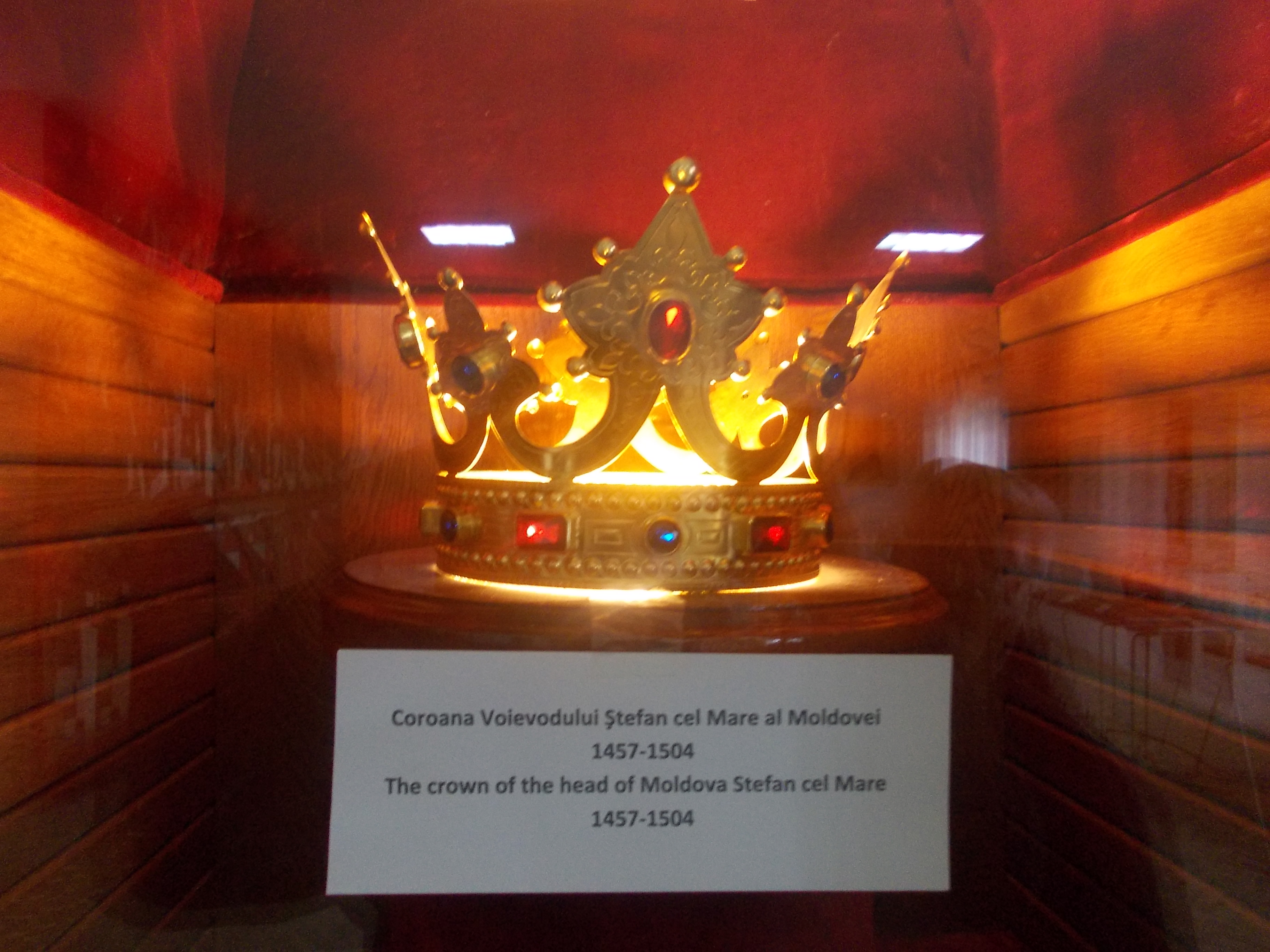 coroana voievodului Moldovei, Ştefan cel Mare